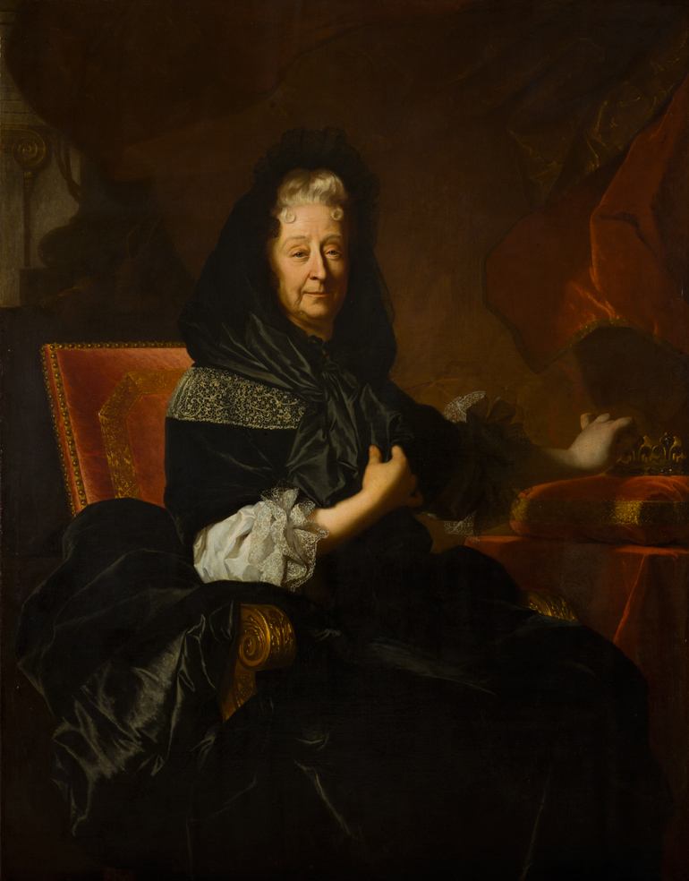 Caption from the museum's website Sur cette œuvre de grande qualité, la duchesse de Nemours est représentée de trois quarts, assise dans un fauteuil, le visage tourné vers le spectateur. Veuve, elle porte une robe sombre. D’une main, elle retient les pans d’une mante nouée autour de son cou tandis que, de l’autre, elle touche une couronne fleurdelisée placée en arrière-plan sur un coussin de velours cramoisi. Les tonalités rouges utilisées pour les éléments du décor installent le modèle dans un écrin au centre duquel les carnations claires de son visage et de ses mains se détachent sur la masse noire de sa robe. Mise en valeur par un habile effet d’éclairage, Marie de Nemours affiche ici clairement son rang. Fille d’Henri II d’Orléans-Longueville et de Louise de Bourbon, elle est issue de deux maisons royales de France. La couronne ornée de fleurs de lys posée près d’elle désigne sa qualité de princesse de sang. Dans ses Mémoires, Saint-Simon décrit la duchesse comme une femme « altière au dernier point », qui « avait infiniment d’esprit avec une langue éloquente et animée, à qui elle ne refusait rien ». En lui conférant une expression narquoise, Rigaud traduit à merveille le tempérament autoritaire et fier de l’aristocrate, âgée ici de presque quatre-vingt ans. Son caractère bien trempé s’illustre dans une affaire qui l’occupera pendant de longues années. Ecartée en raison de la « primauté masculine » de l’héritage du Pays de Neuchâtel reçu en 1504 en apanage par la famille d’Orléans-Longueville, elle entame à partir de 1674 une longue croisade, allant jusqu’à s’opposer à Louis XIV. Lors de procès retentissants, elle s’insurge contre l’exclusion des femmes de l’exercice du pouvoir. Finalement, en 1694, soutenue par le peuple neuchâtelois, elle est reconnue leur souveraine légitime.